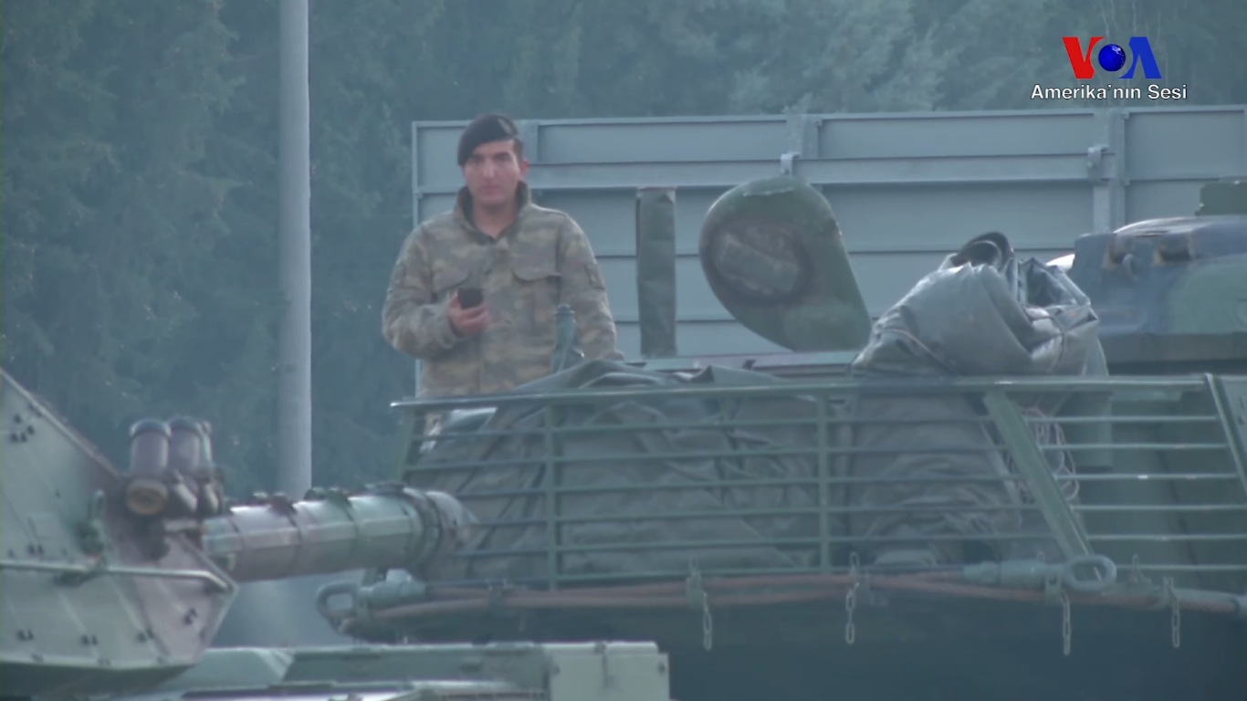 “Zeytin Dalı Harekatı" Afrin’deki hedefleri bombalanmasıyla başladı. Hatay’ın Reyhanlı ve Kırıkhan ilçeleri arasındaki sınır hattında 2. Ordu Komutanlığına bağlı birliklerden gelen çok sayıda tank ve zırhlı araç ikinci bir emre kadar yol boyunca bekletiliyor.